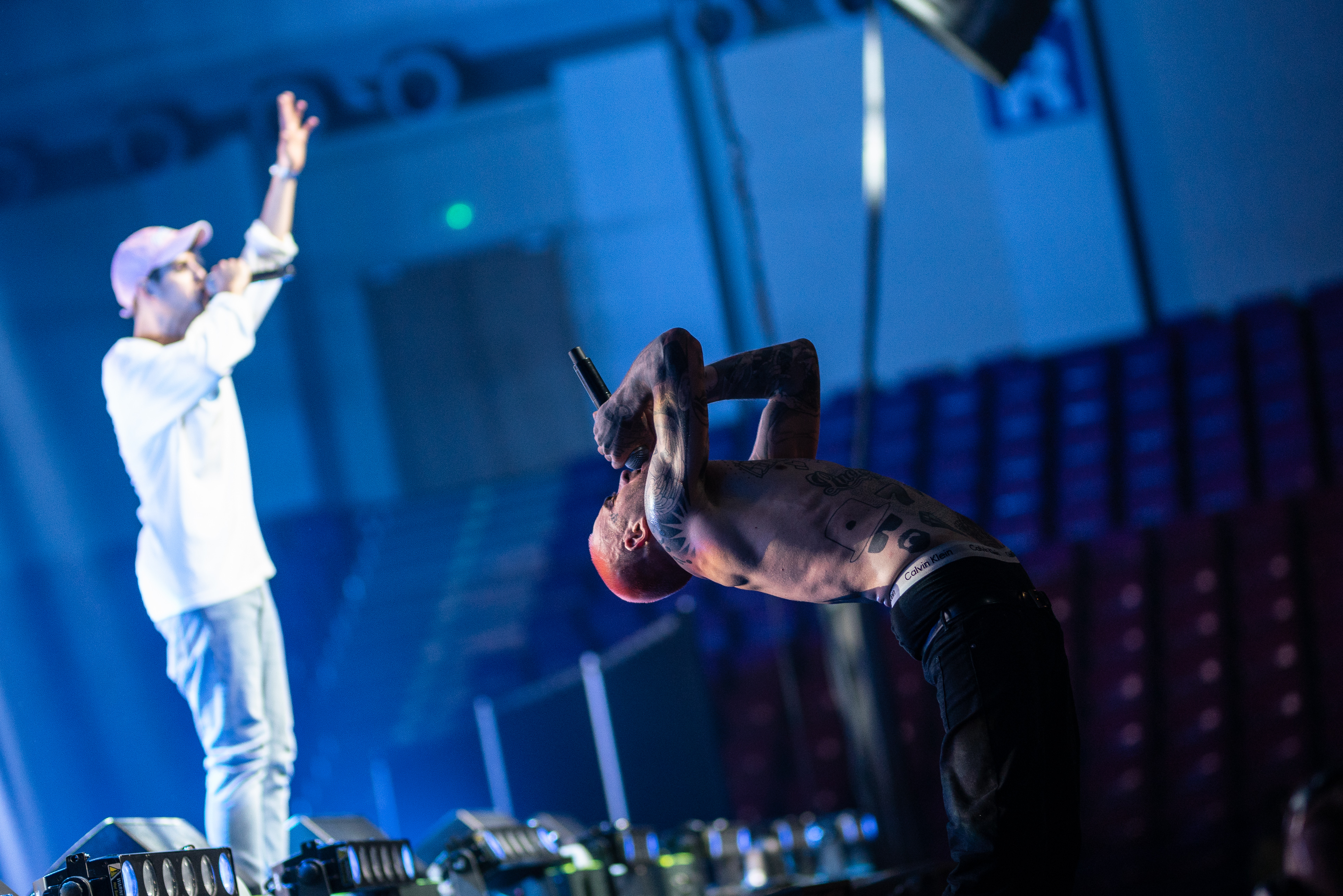 Taconafide podczas koncertu w Warszawie w ramach trasy Ekodiesel Tour promującej debiutancki album Soma 0,5 mg.